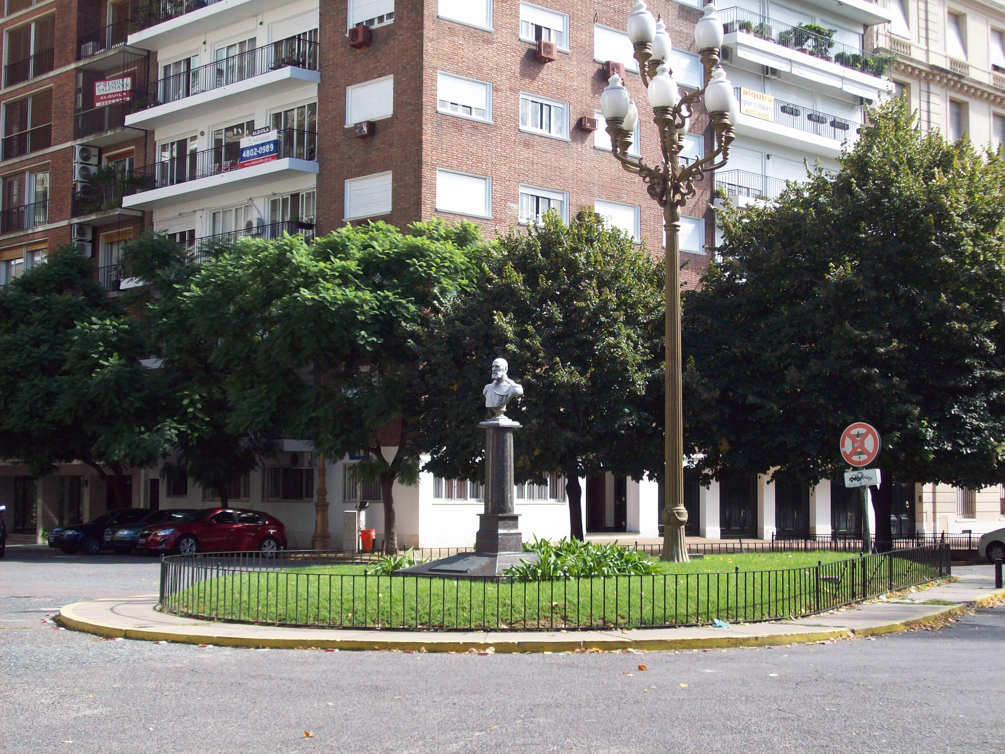 Plazoleta Gelly y Obes, Recoleta, Buenos Aires.